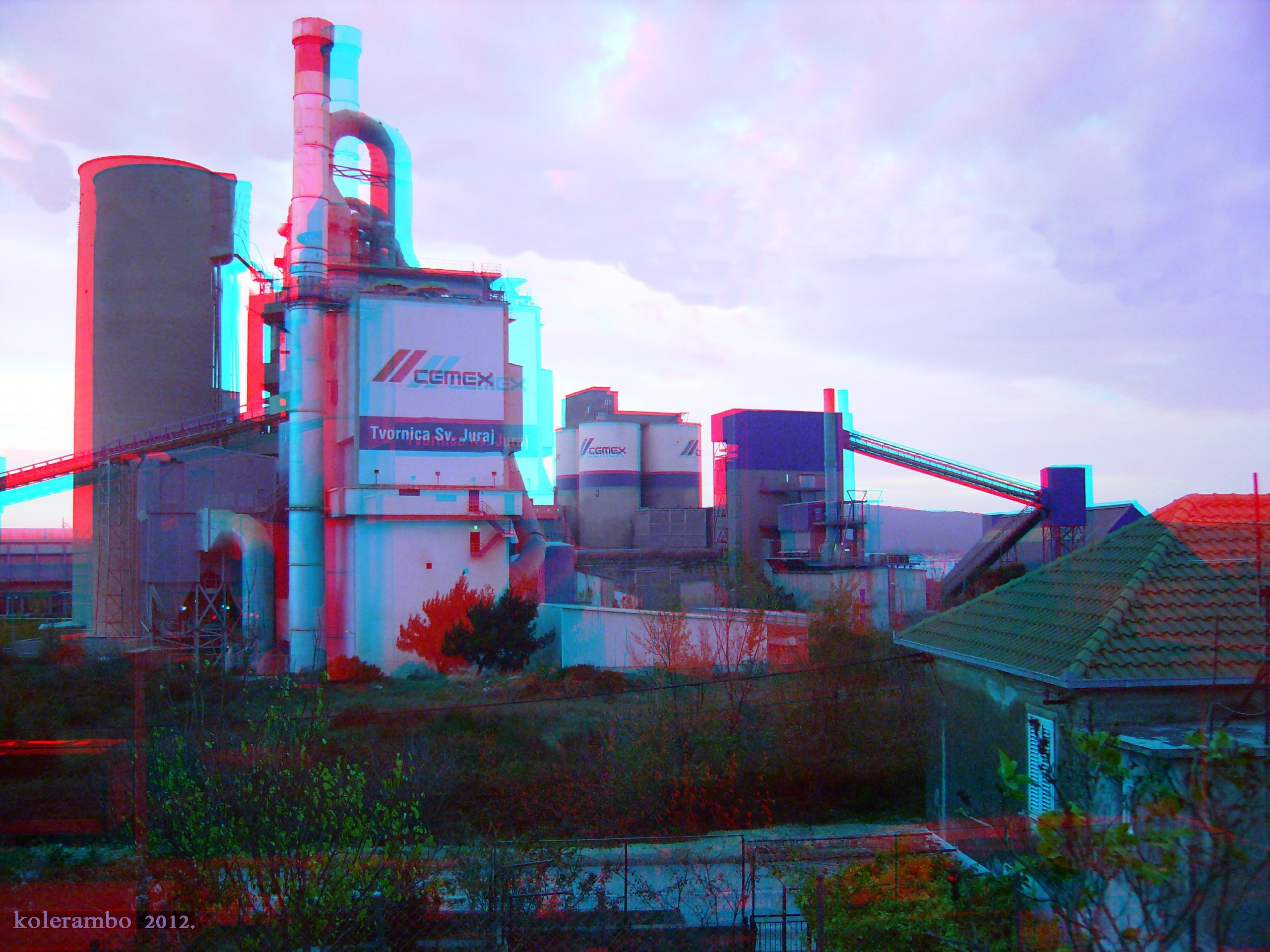 ...cementara u 3D...